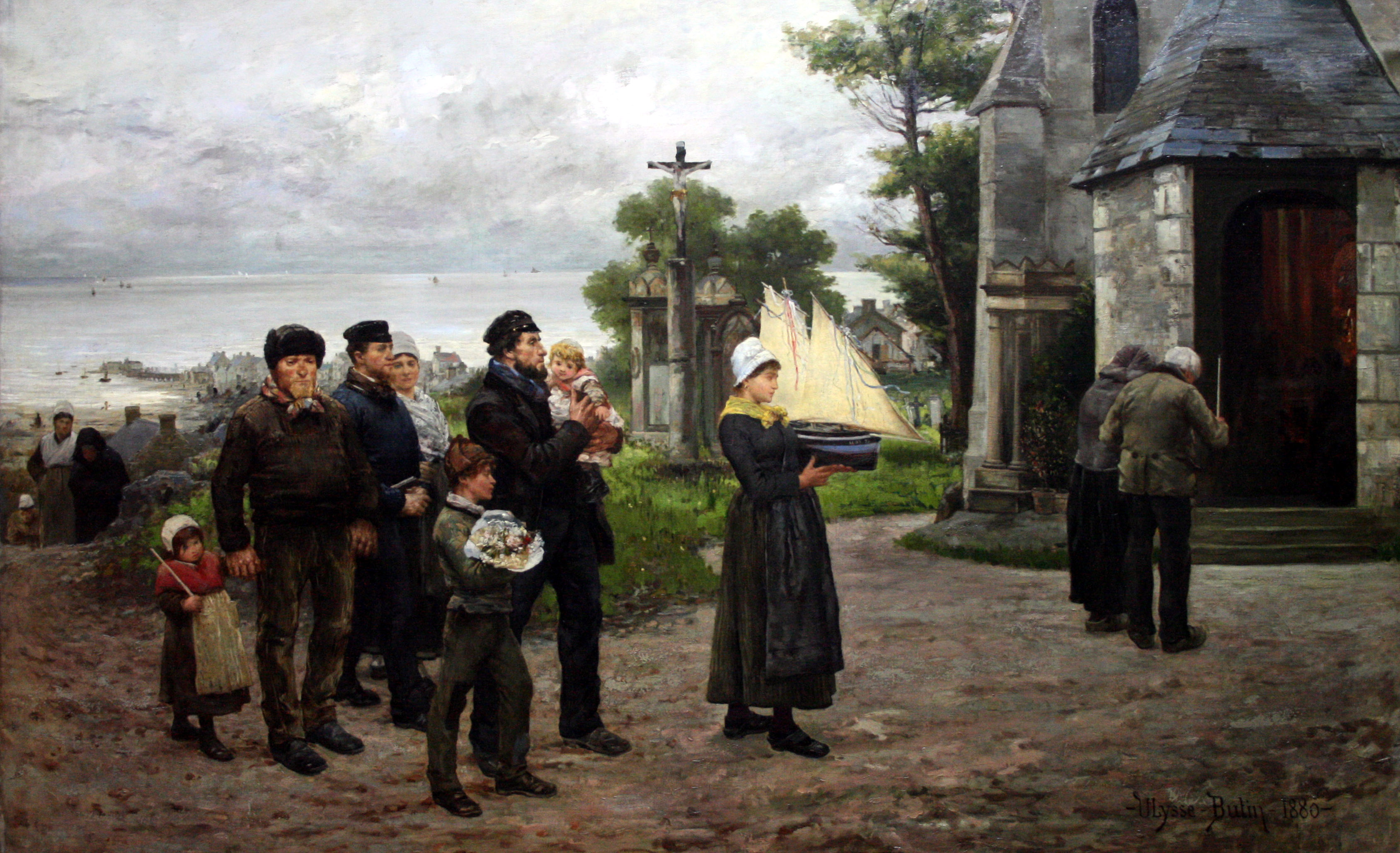 Ex-Votolabel QS:Lfr,"Ex-Voto"